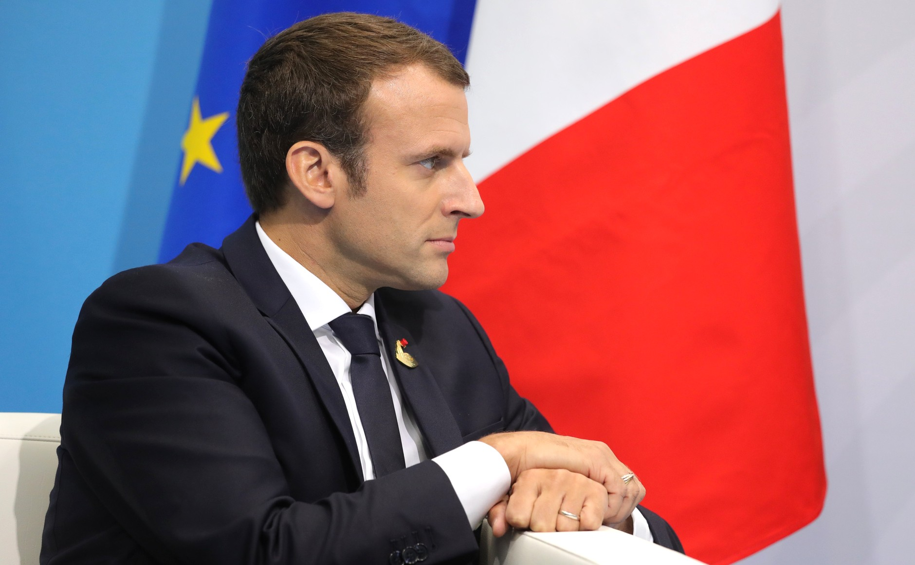 Встреча Президента России Владимира Путина с Президентом Франции Эммануэлем Макроном на полях саммита «Группы двадцати»